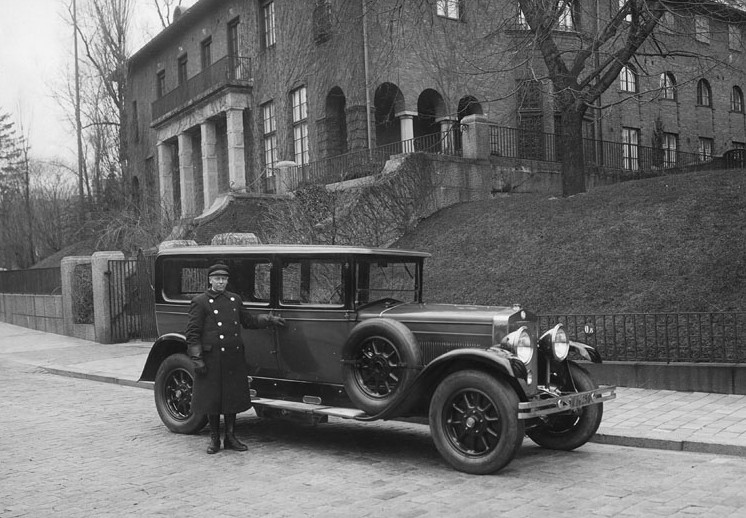 "Tryggerska villan" i Diplomatstaden i Stockholm. Bil och chaufför från Freys hyrverk